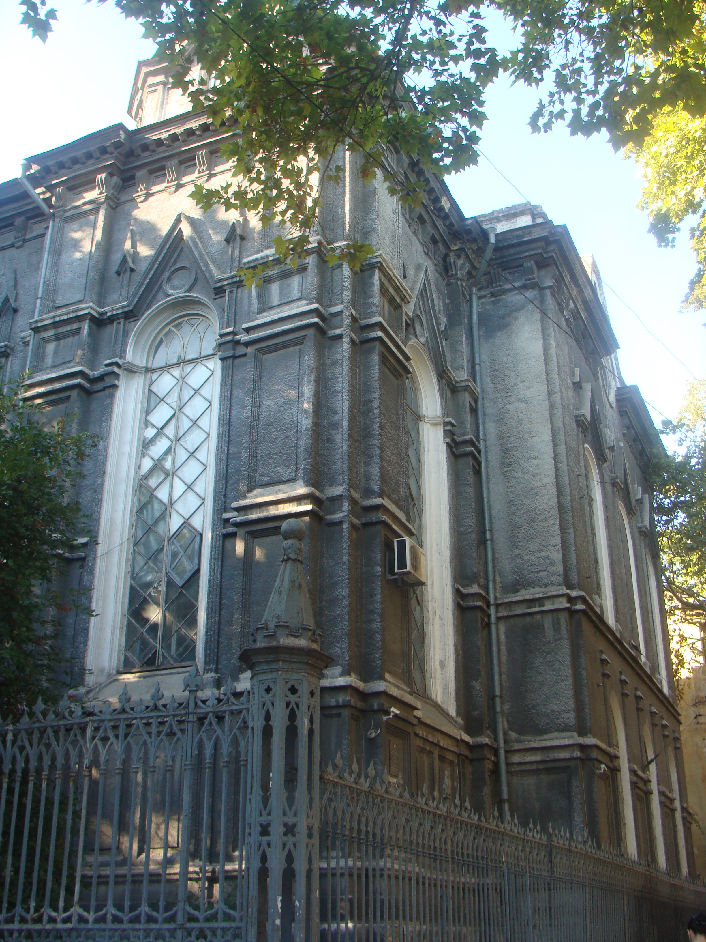 Будівля Бродської синагоги та огорожа, Одеса, Пушкінська вул., 20/18 (ріг вулиць Пушкінської, 20 та Жуковського, 18)